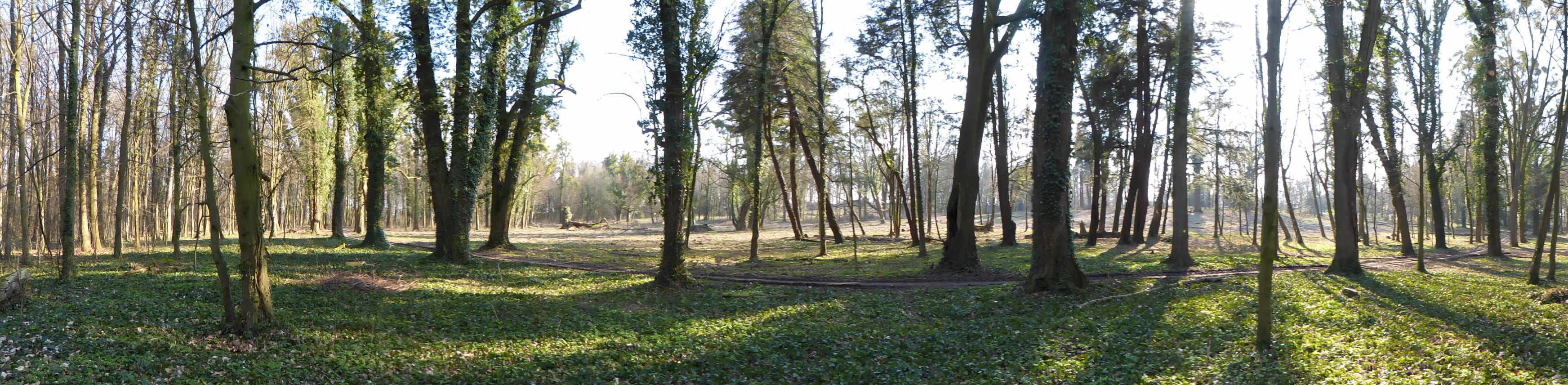 Park zamkowy w Dąbrowie Niemodlińskiej w czasie rewaloryzacji - wiosna 2016 r.